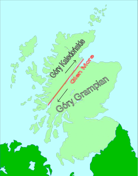 Tektoniczne obniżenie Great Glenn w Szkocji.